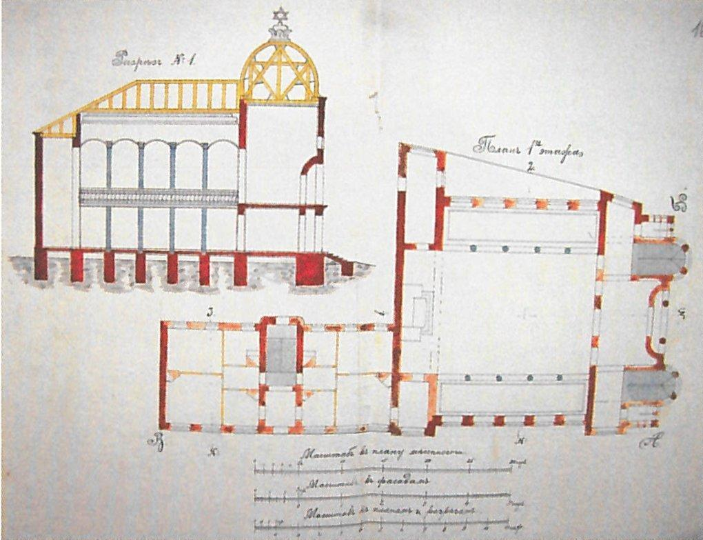 Непабудаваны праект Віленскай харальнай сінагогі аўтарства А. Полазава